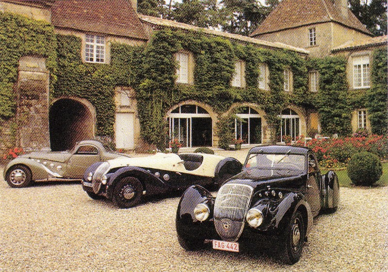 Trois Peugeot 402 Darl'Mat, deux coupés, un roadster